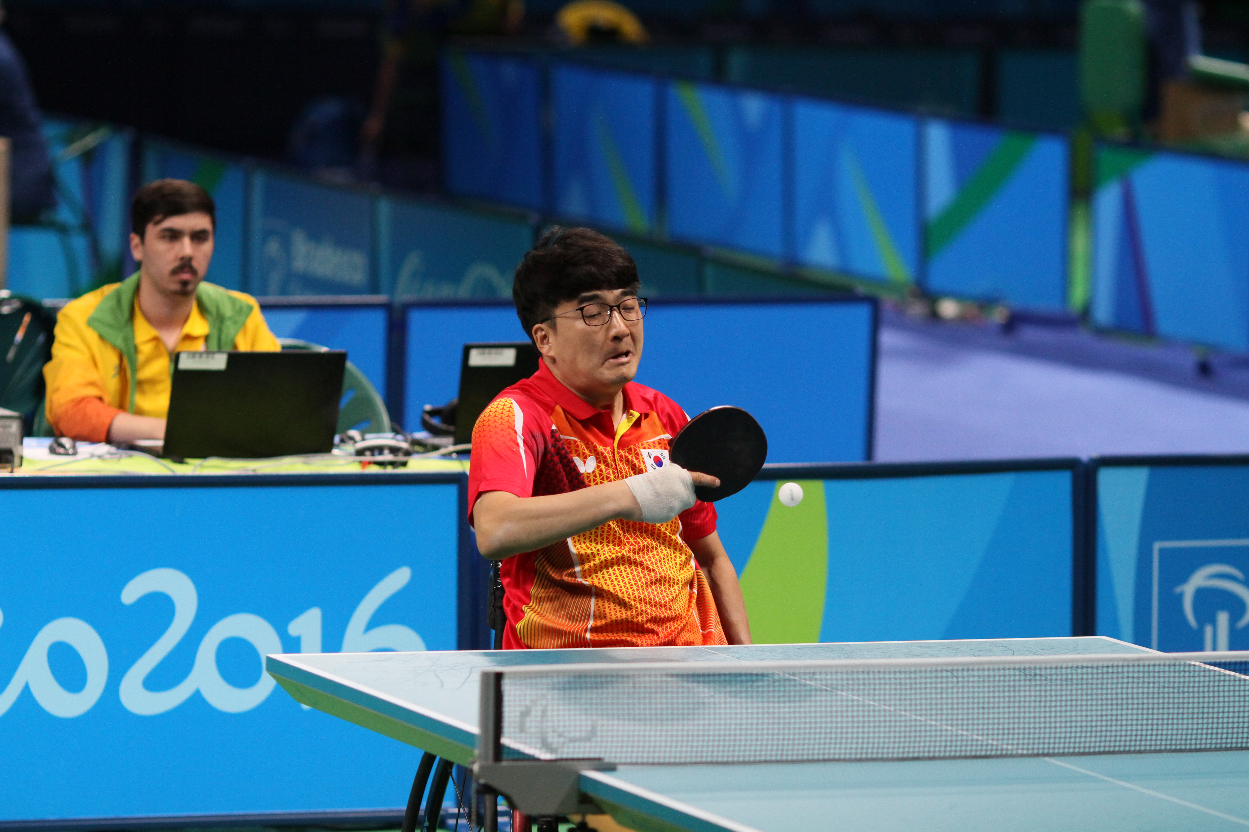 CHA Soo Yong (KOR,M2) IMG_5140